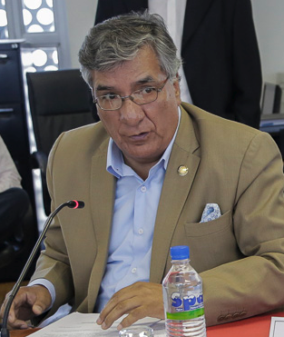 Juan Cárdenas Espinoza. Cropped from File:Asamblea Nacional de Ecuador, 31 de mayo de 2017 - Sesión de la Comisión de los Derechos de los Trabajadores (Juan Cárdenas Espinoza).jpg